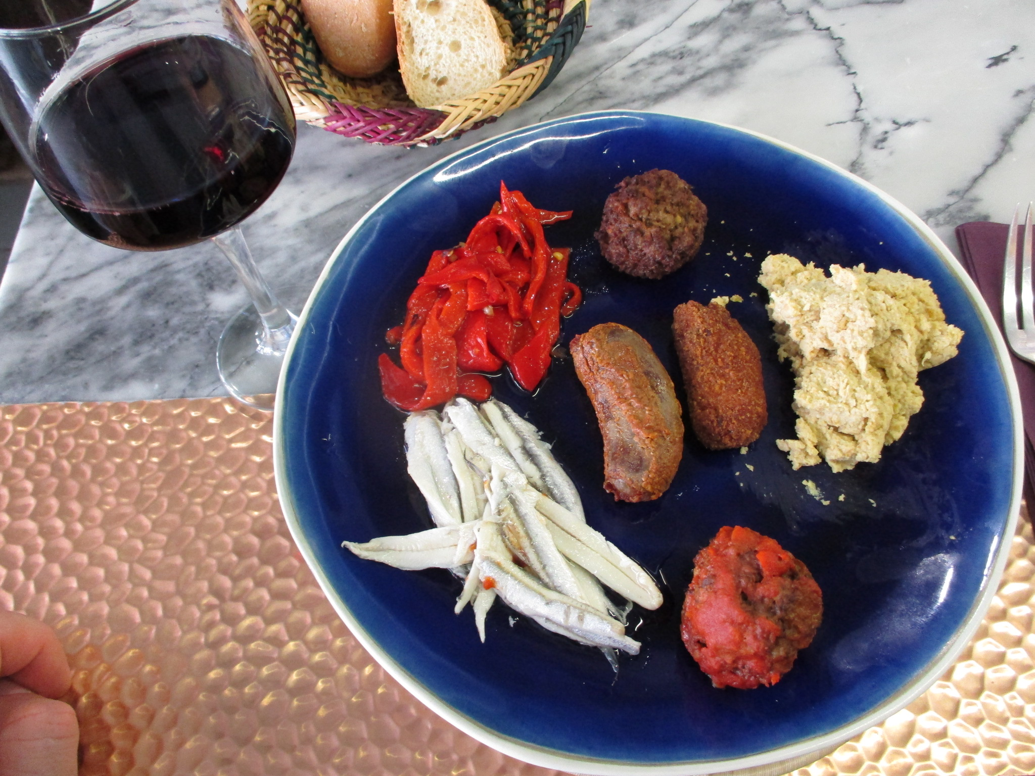 Tapas assortment